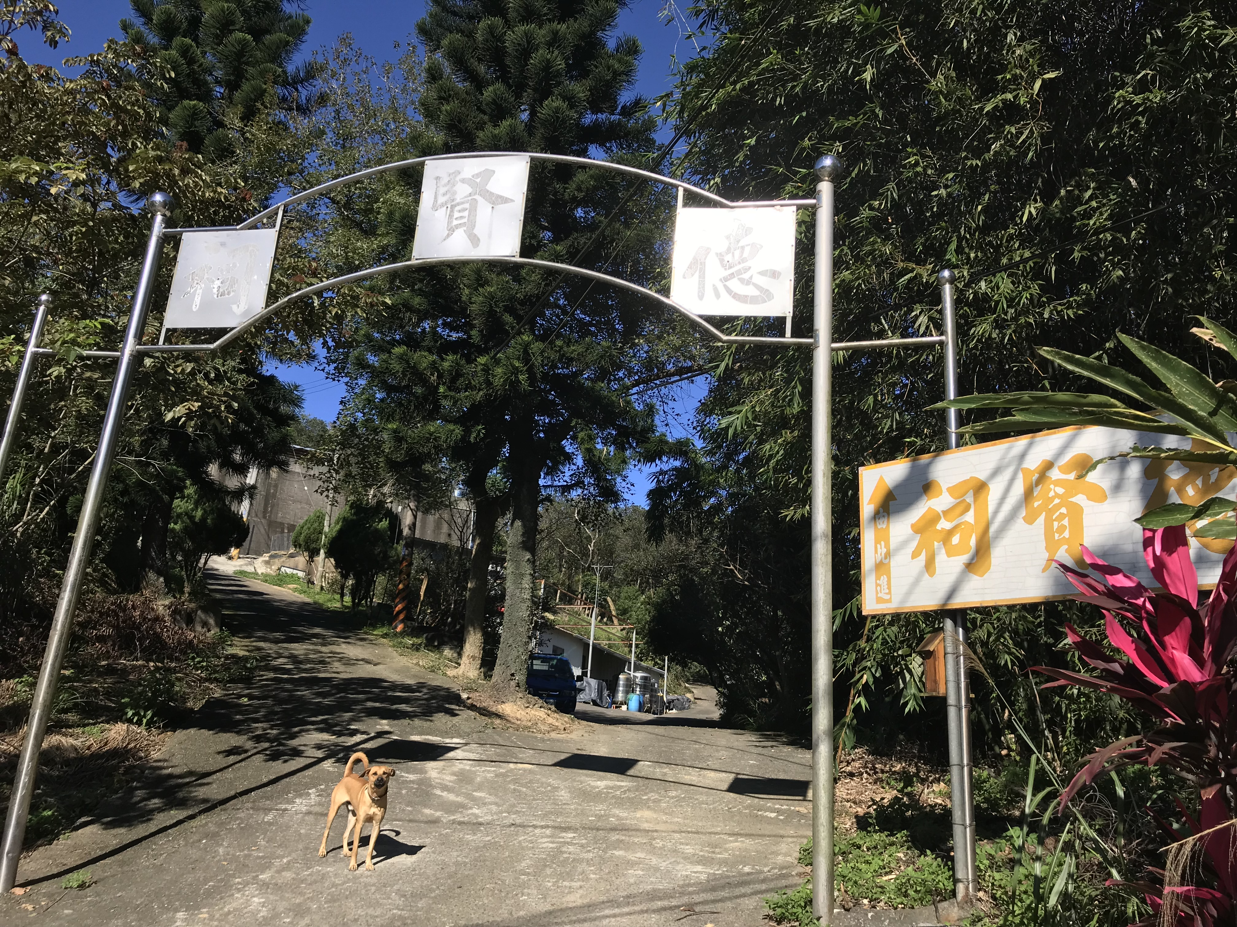 中文（台灣）: 德賢祠入口